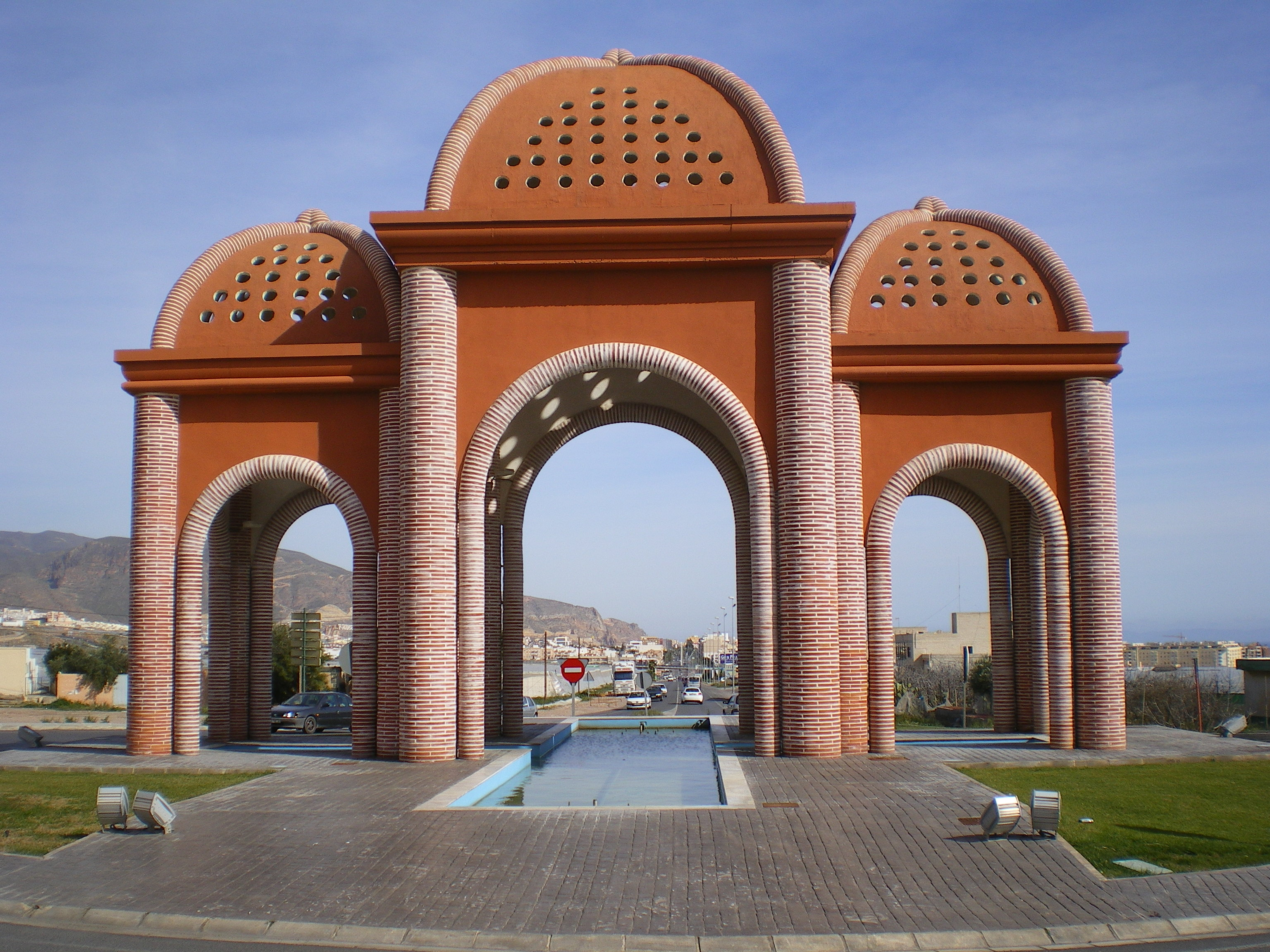 Monumento a la entrada Este de Vícar (Almería), España, en aquella dirección, obra de Mª Ángeles Lázaro Guil, ejecutada en 2007.